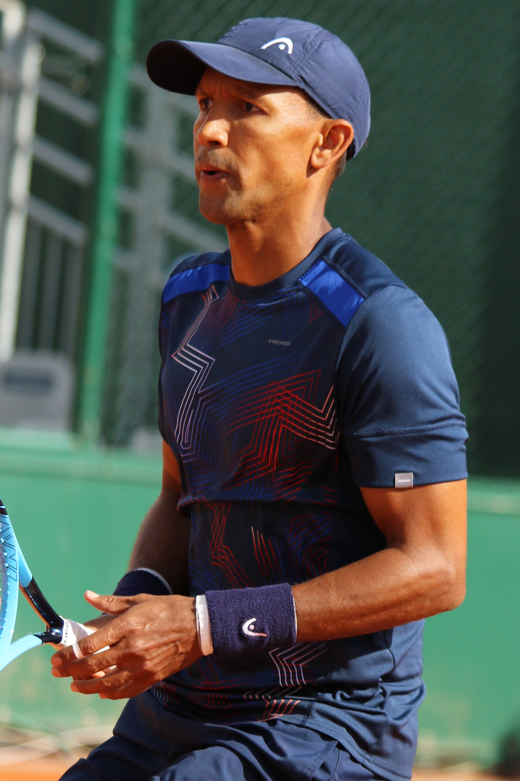 Klaasen RG19 (8)